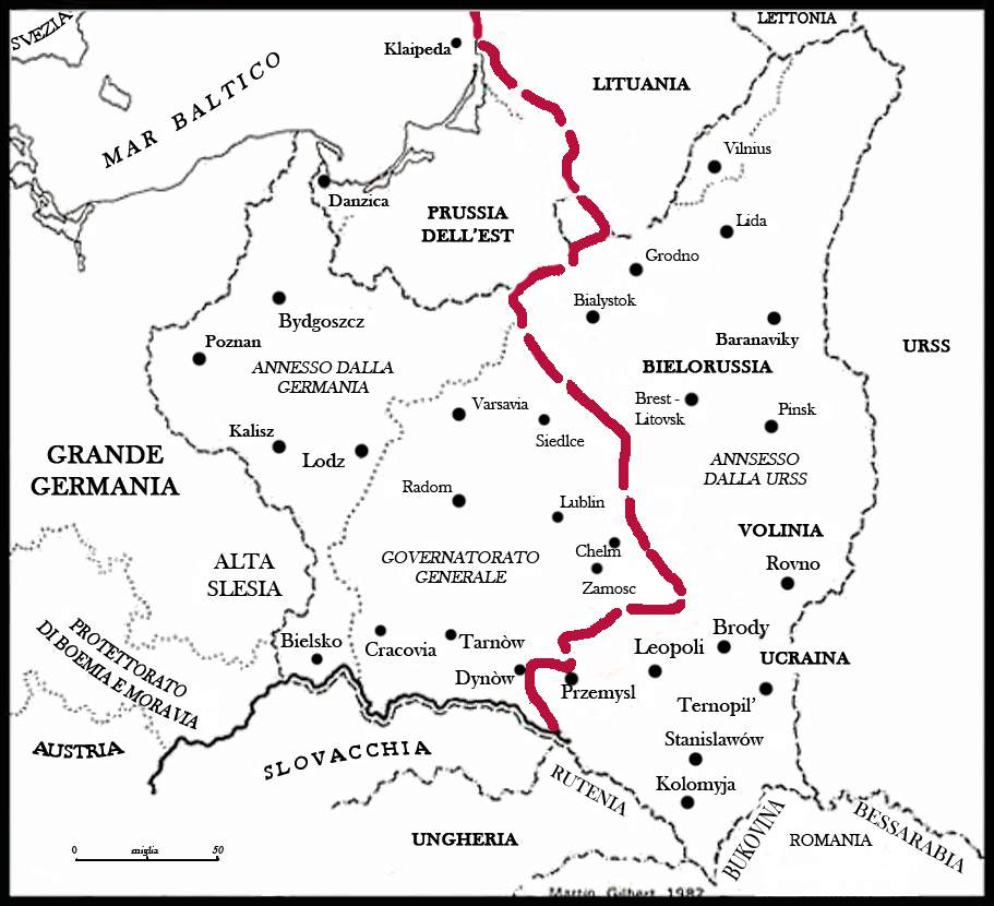 Linia Mołotowa